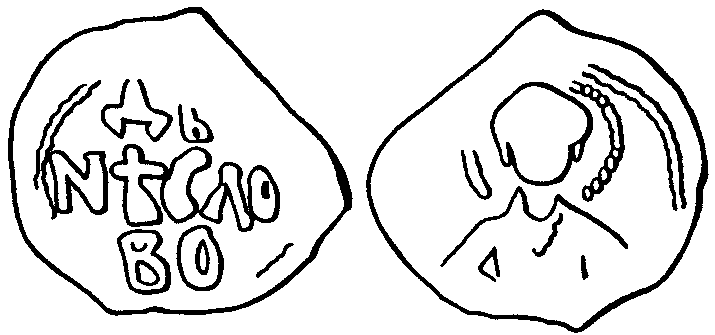 Пячатка епіскапа Міны